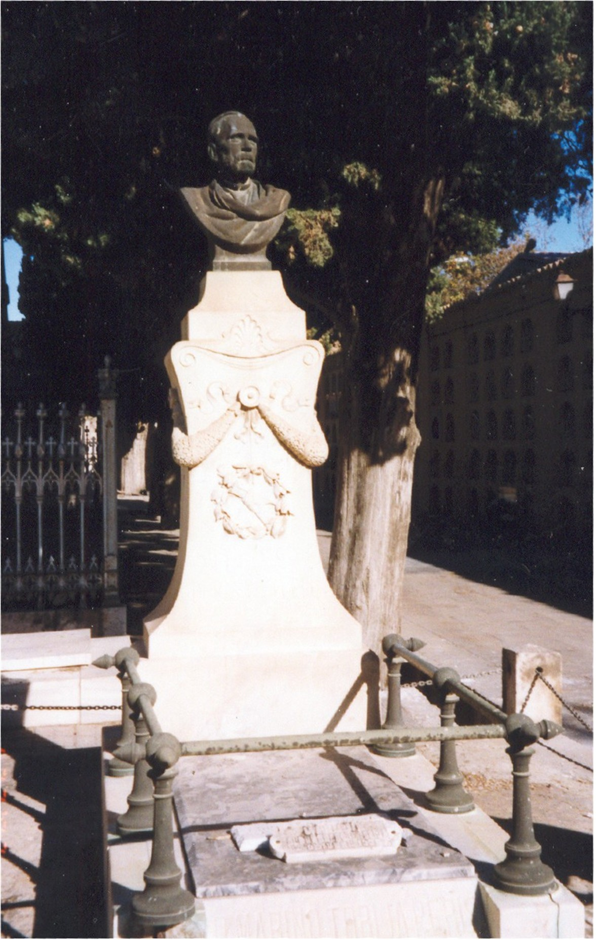 Panteón de Peris y Valero. Cemeterio Municipal de Valencia. El busto está fundido en bronce por Vicente Ríos